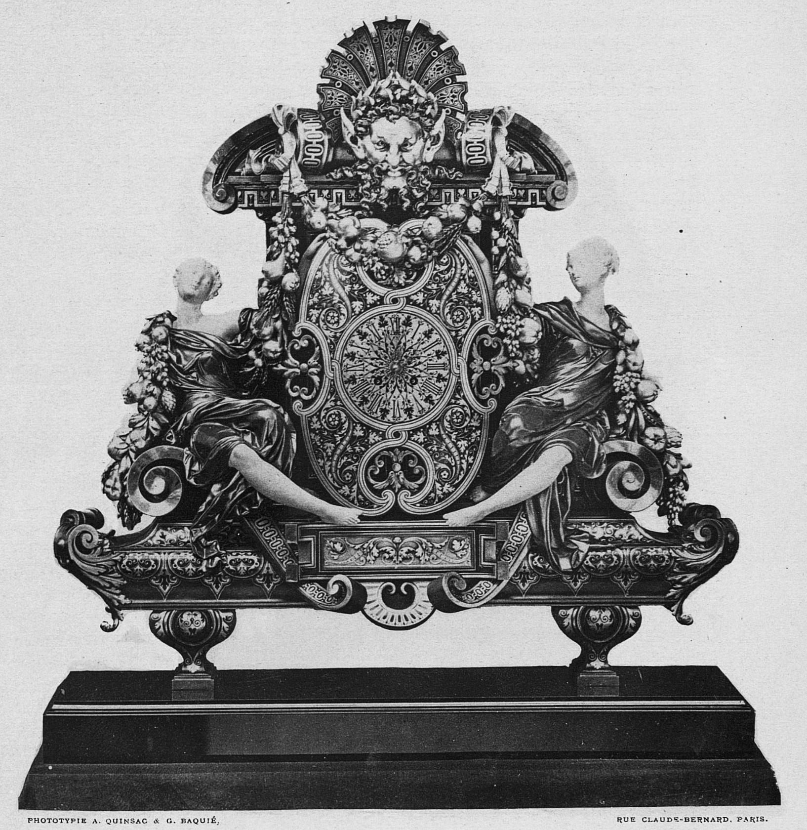 Pendule Renaissance en argent émaillé, composée par Constant Sévin et exécutée par la maison Ferdinand Barbedienne